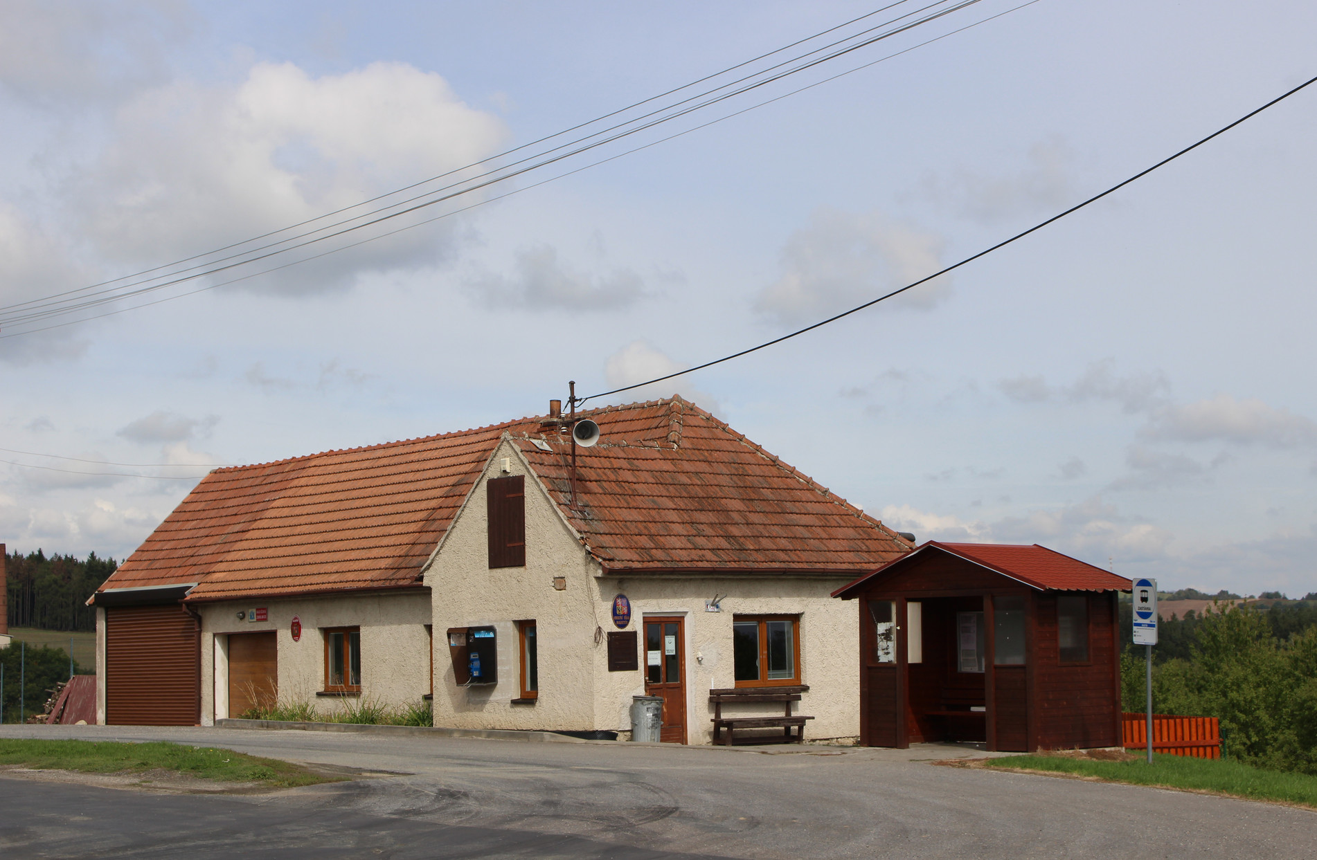 obec Rojetín, okres Brno-venkov, budova obecního úřadu, hasičská zbrojnice a zastávka autobusu